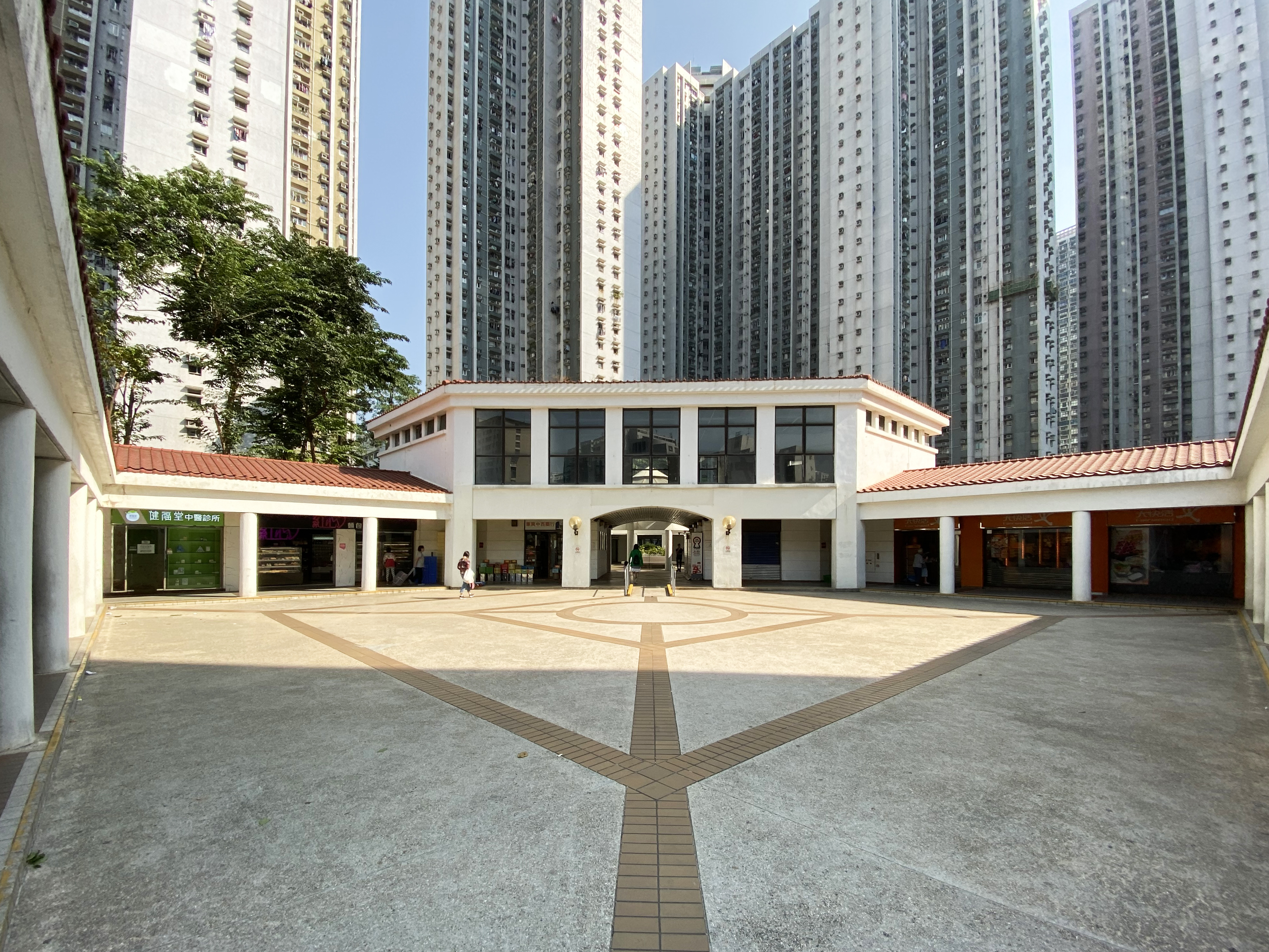 Siu Lun Shopping Centre